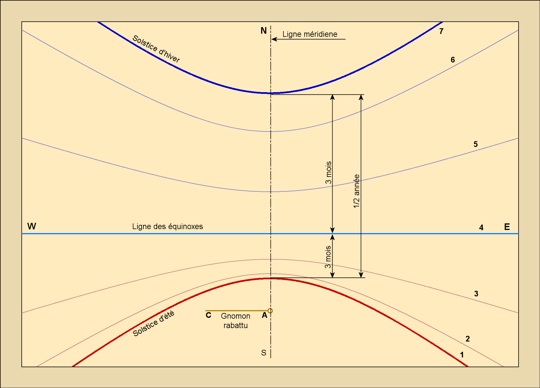 Projection des arcs diurnes d'un gnomon sur un plan horizontal pour une latitude de 50° N.